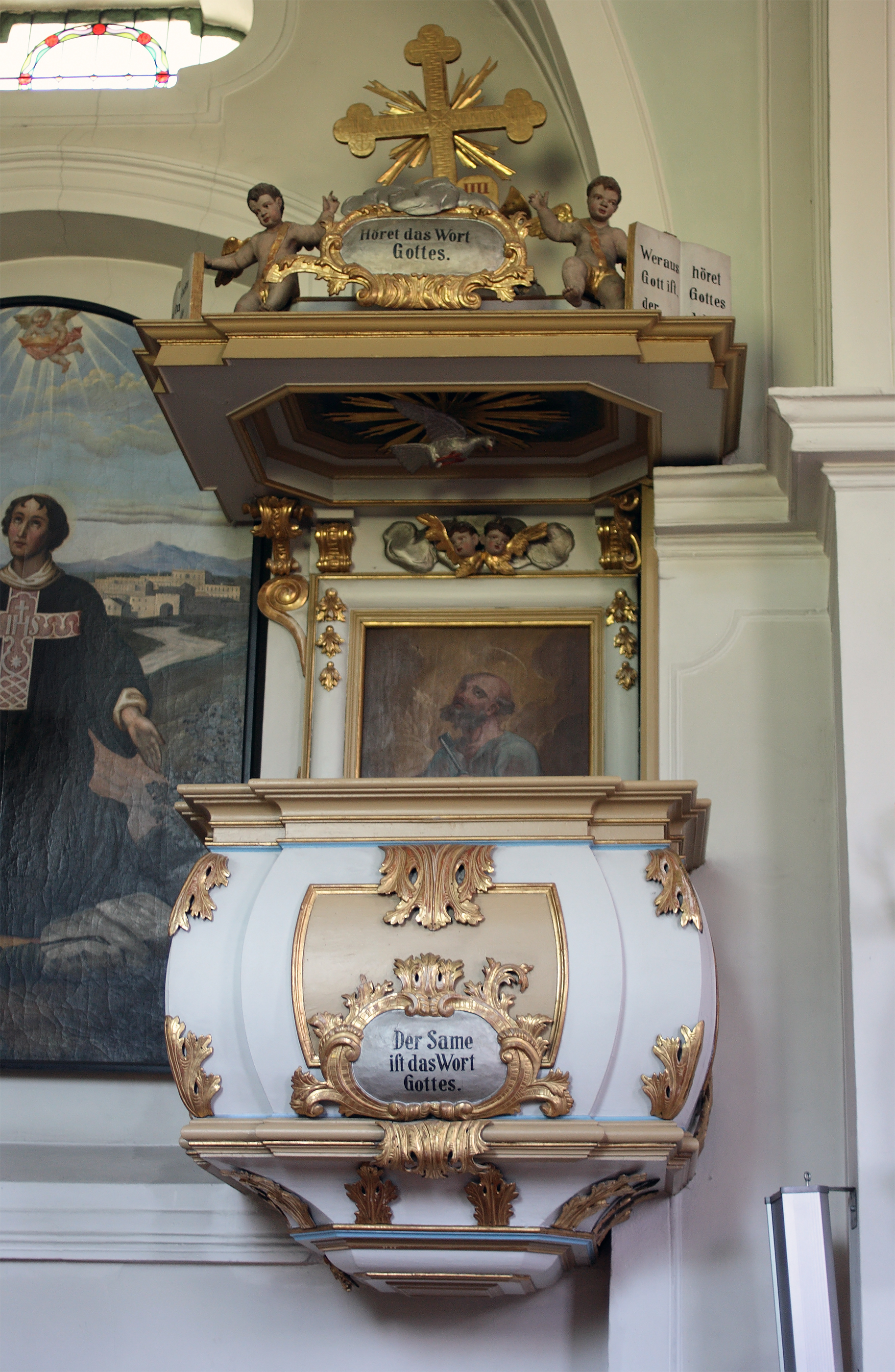 Die Kanzel der Leonsteiner Pfarrkirche